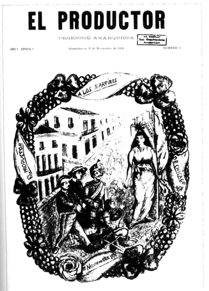 El Productor